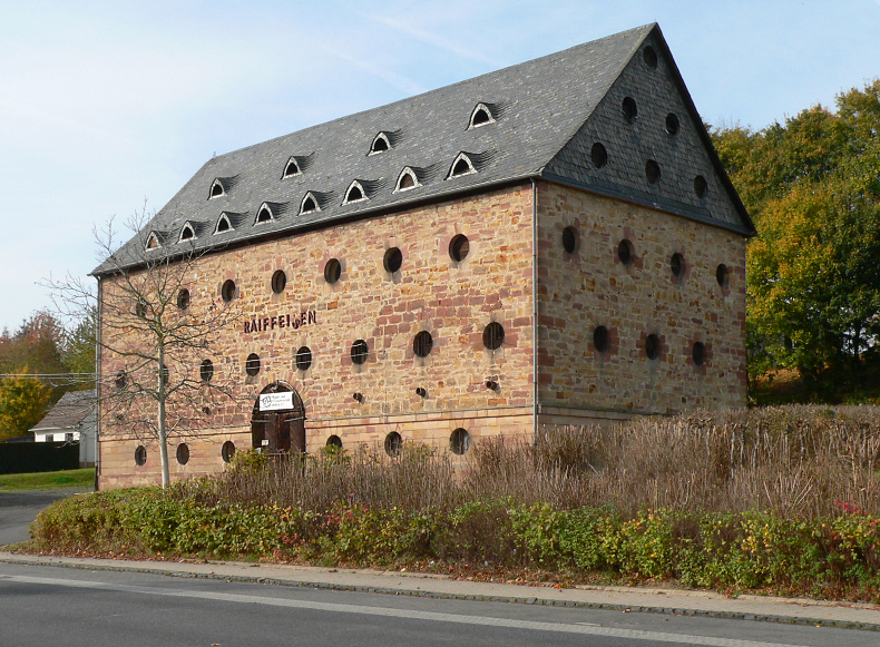 Ehemalige landgräflich-hessische Zehntscheune in Jesberg